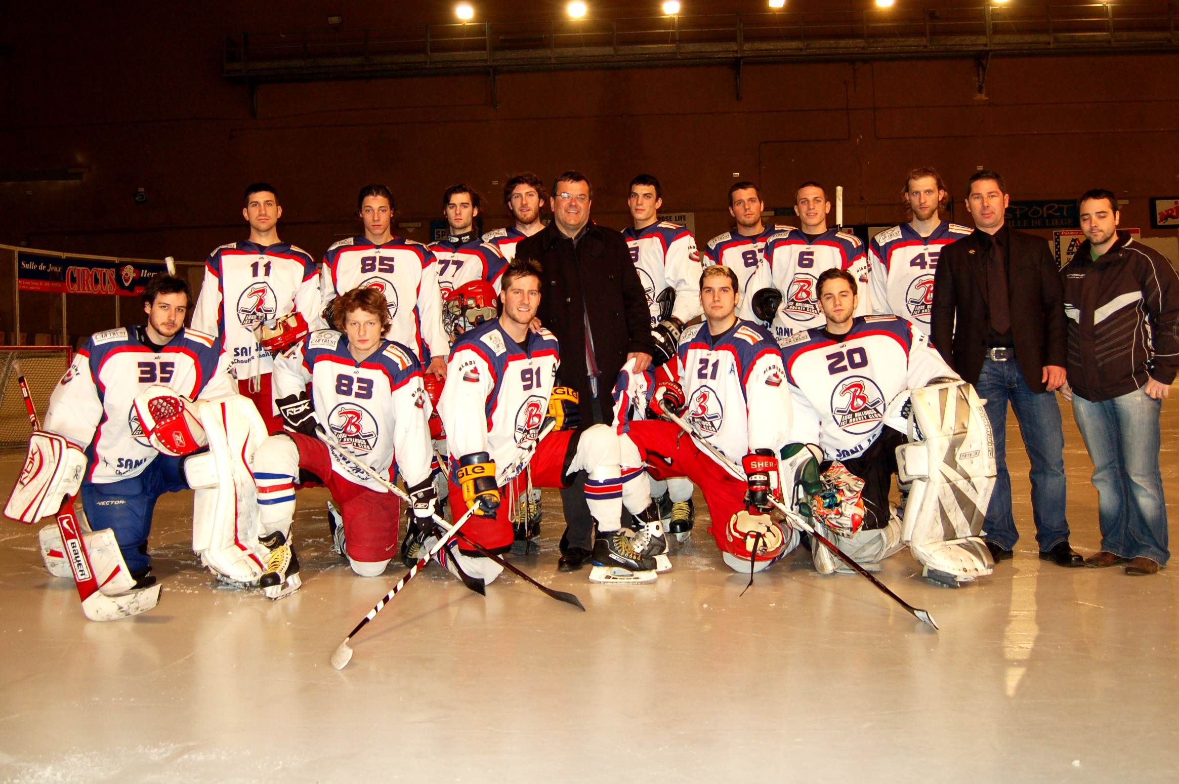 Remise de la vareuse officielle des Bulldogs de Liège à son Président d'Honneur Monsieur Willy Demeyer, bourgmestre de Liège.